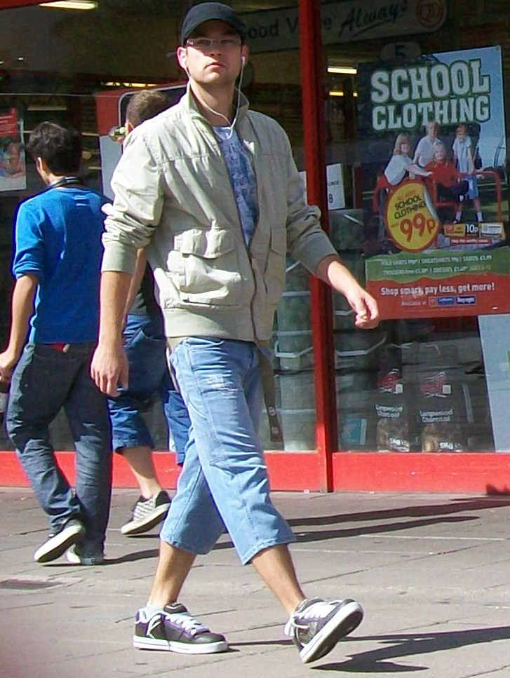 Stevenage, 1 September 2009